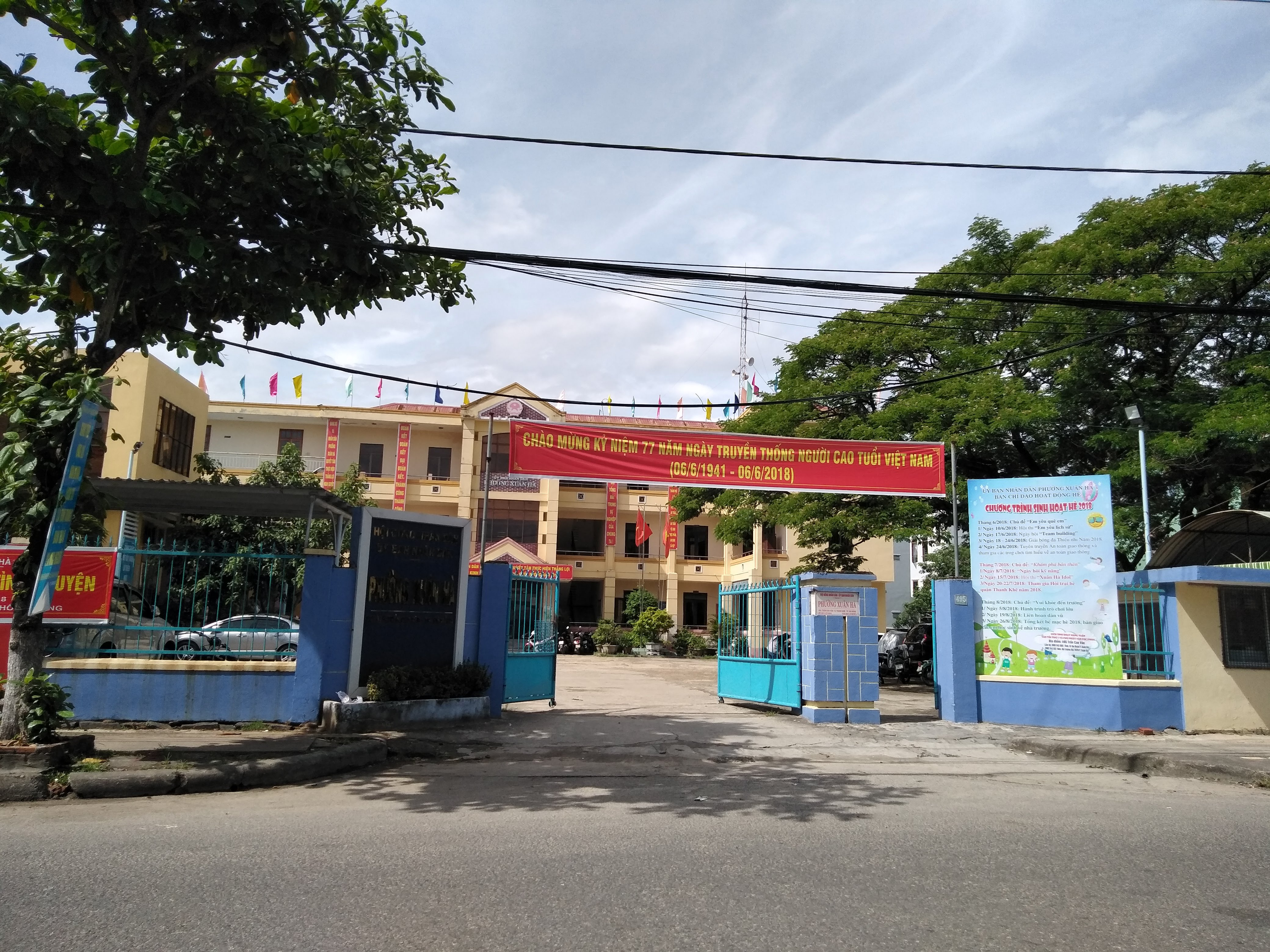 UBND phường Xuân Hà Thanh Khê Đà Nẵng